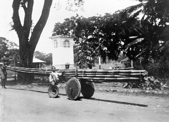 Repronegatief. Gladak (voor bamboe transport), Keboemen, Midden Java